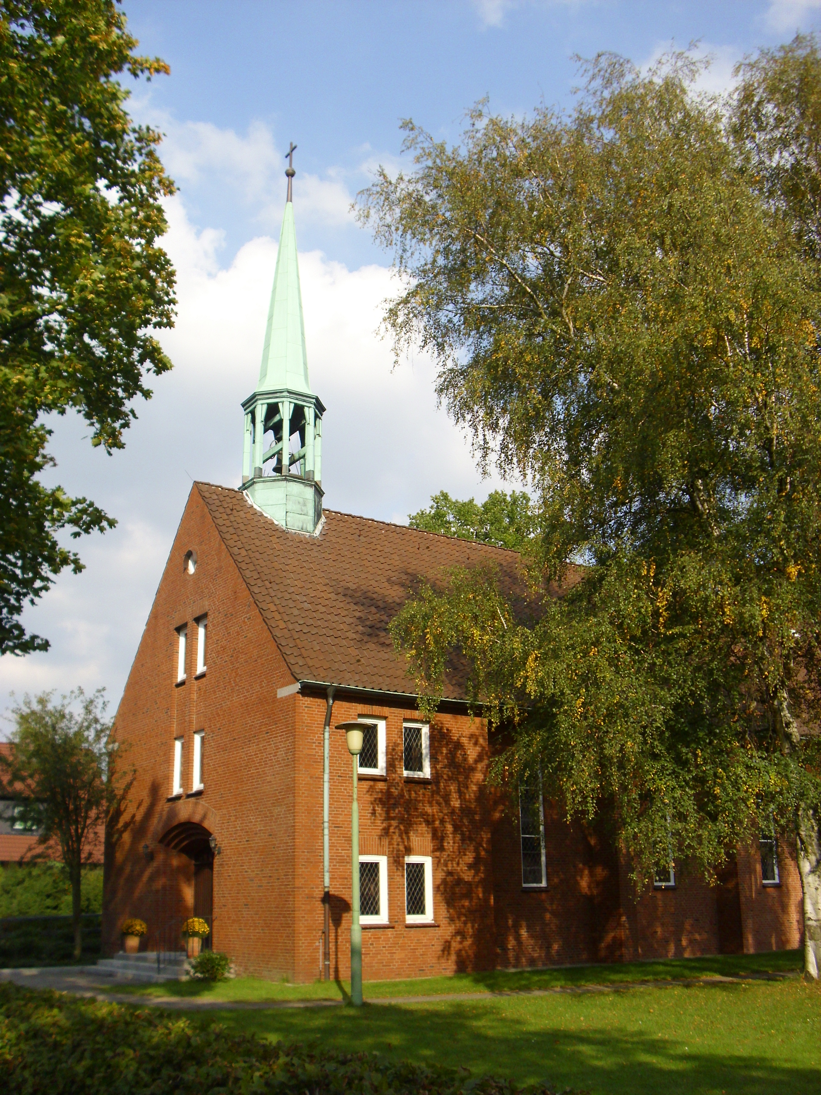 Broder-Hinrick-Kirche, Tangstedter Landstraße 220, in Hamburg-Langenhorn